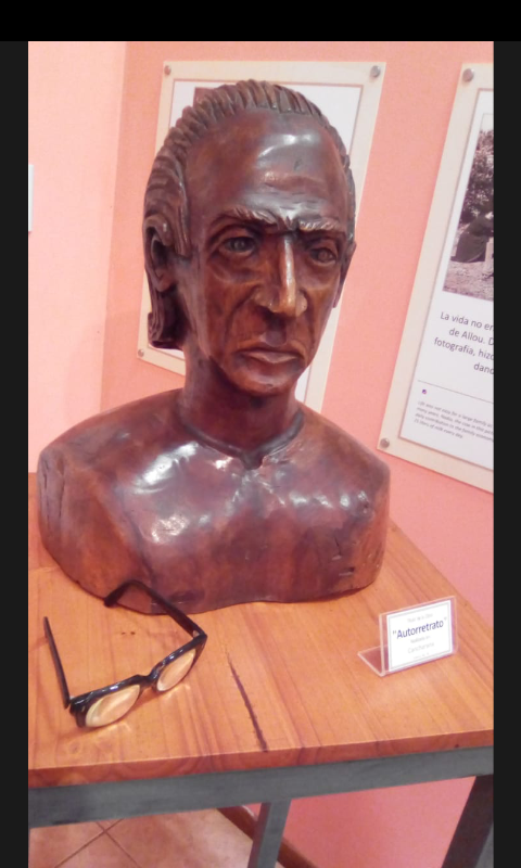 Es una escultura en madera de cancharana de un auto retrato del escultor Don Rodolfo Teofilo Allou, forma parte de la colección del Museo Imágenes de la Selva de Puerto Iguazú. Nació en Paraguay, en 1909, de profesión odontólogo, después de la Guerra del Chaco Paraguayo emigro hacia la Argentina, en el que junto a su profesión se destacó como un artista silencioso trabajando la madera autóctona.Auto retrato